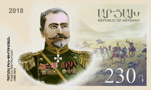 Poghos Bek-Pirumyan